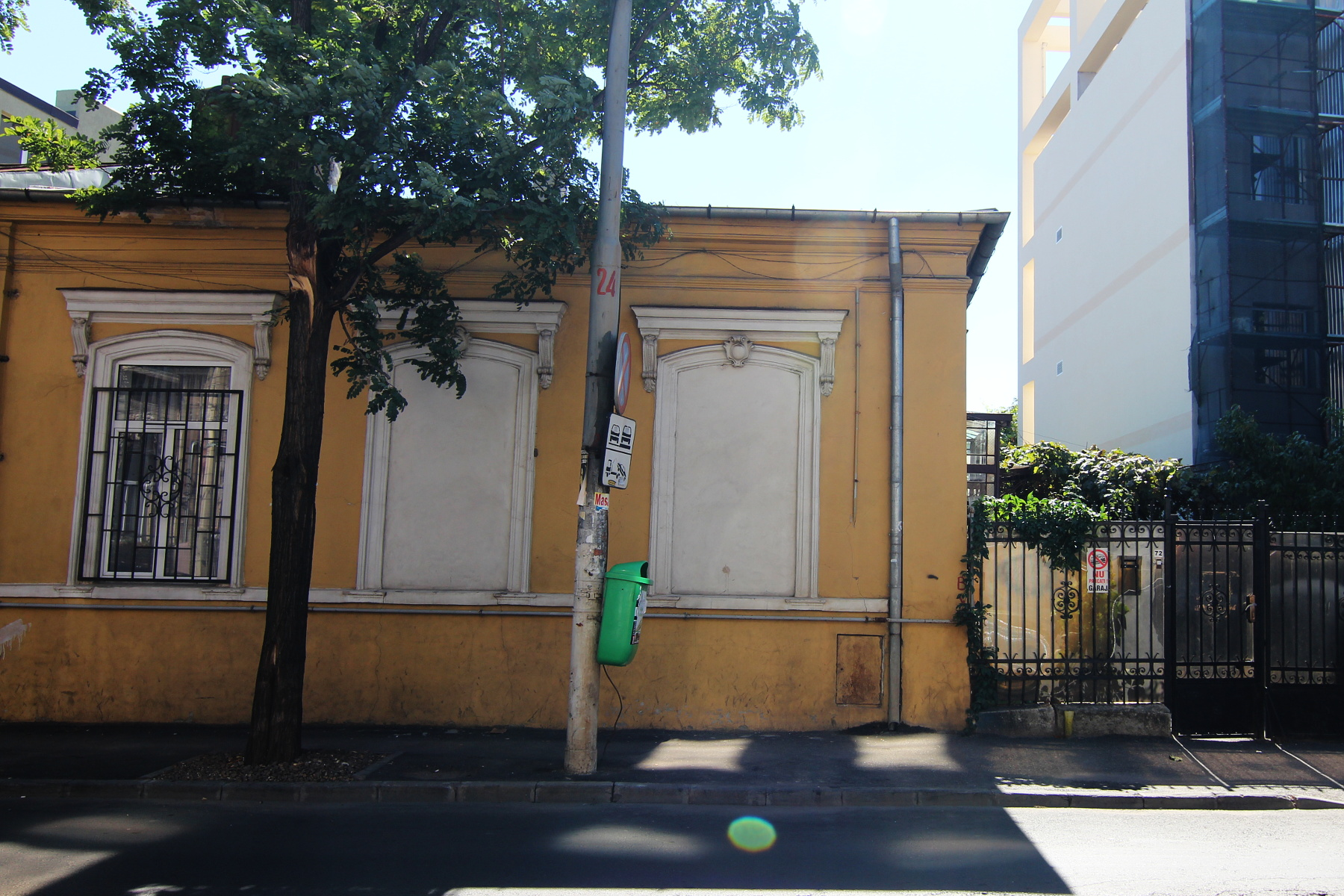 Casă pe Calea Călărașilor